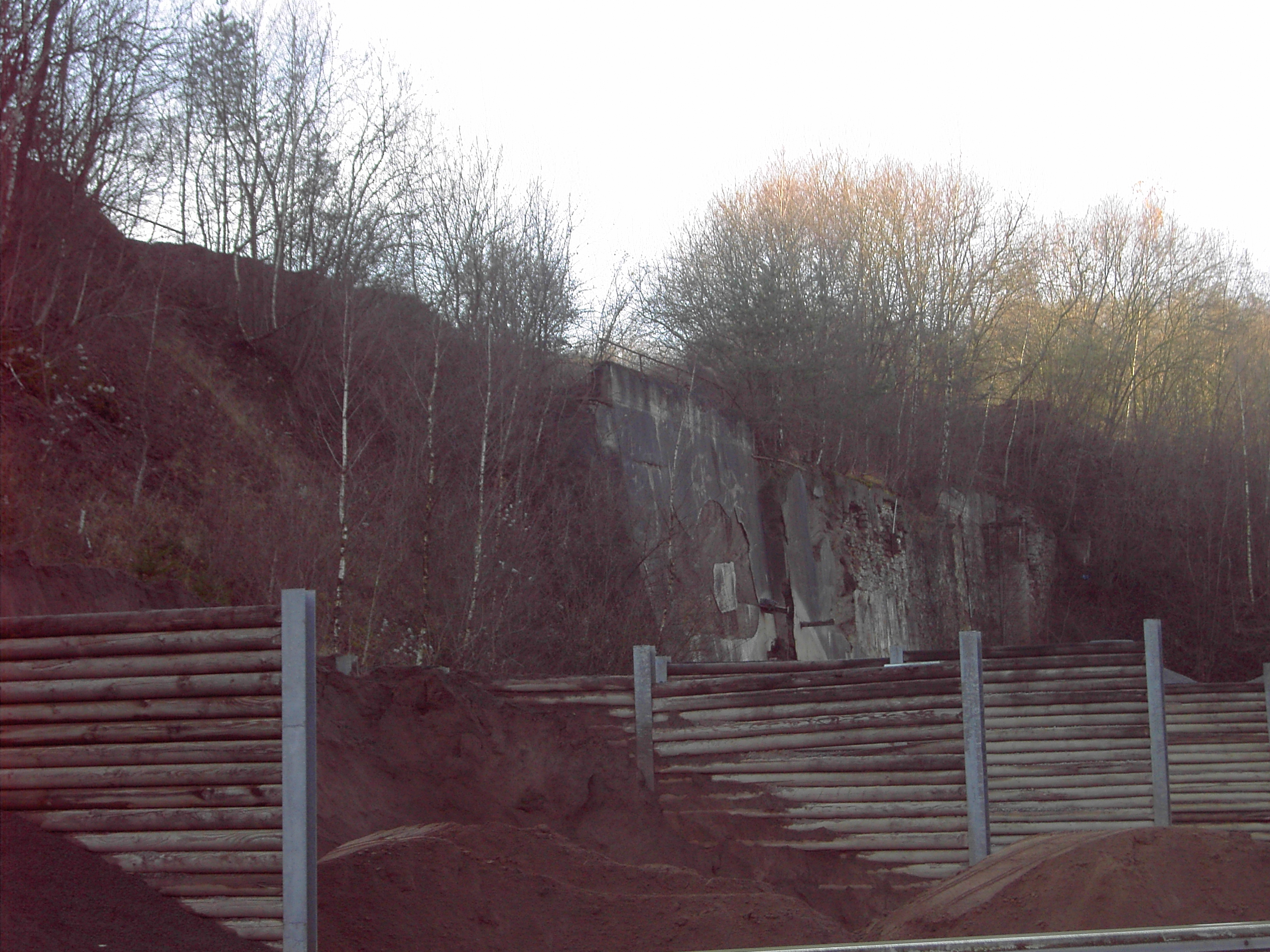 Teerschotterwerk im NSG Rüst mit alten Öfen im Hintergrund